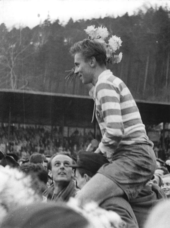 Zentralbild-Funck-Schlegel Fu-Ho. 12.11.1956 Wismut wurde neuer Fußballmeister - Am Sonntag, dem 11.11.1956, standen sich in Aue im entscheidenden Kampf um die Meisterschaft Wismut Karl-Marx-Stadt und Lok Leipzig gegenüber. Durch einen 1:0-Sieg wurde Wismut neuer Titelträger unserer Republik. UBz: Auf den Schultern der begeisterten Fußball-Anhänger wurde der Stopper des SC Wismut Karl-Marx-Stadt, Brinkfried Müller, nach der Siegerehrung vom Platz getragen. Information added by Wikimedia users. Korrekter Name: Bringfried Müller